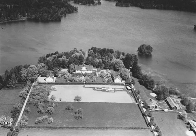 Flygfoto över Almnäs gård, Tveta socken